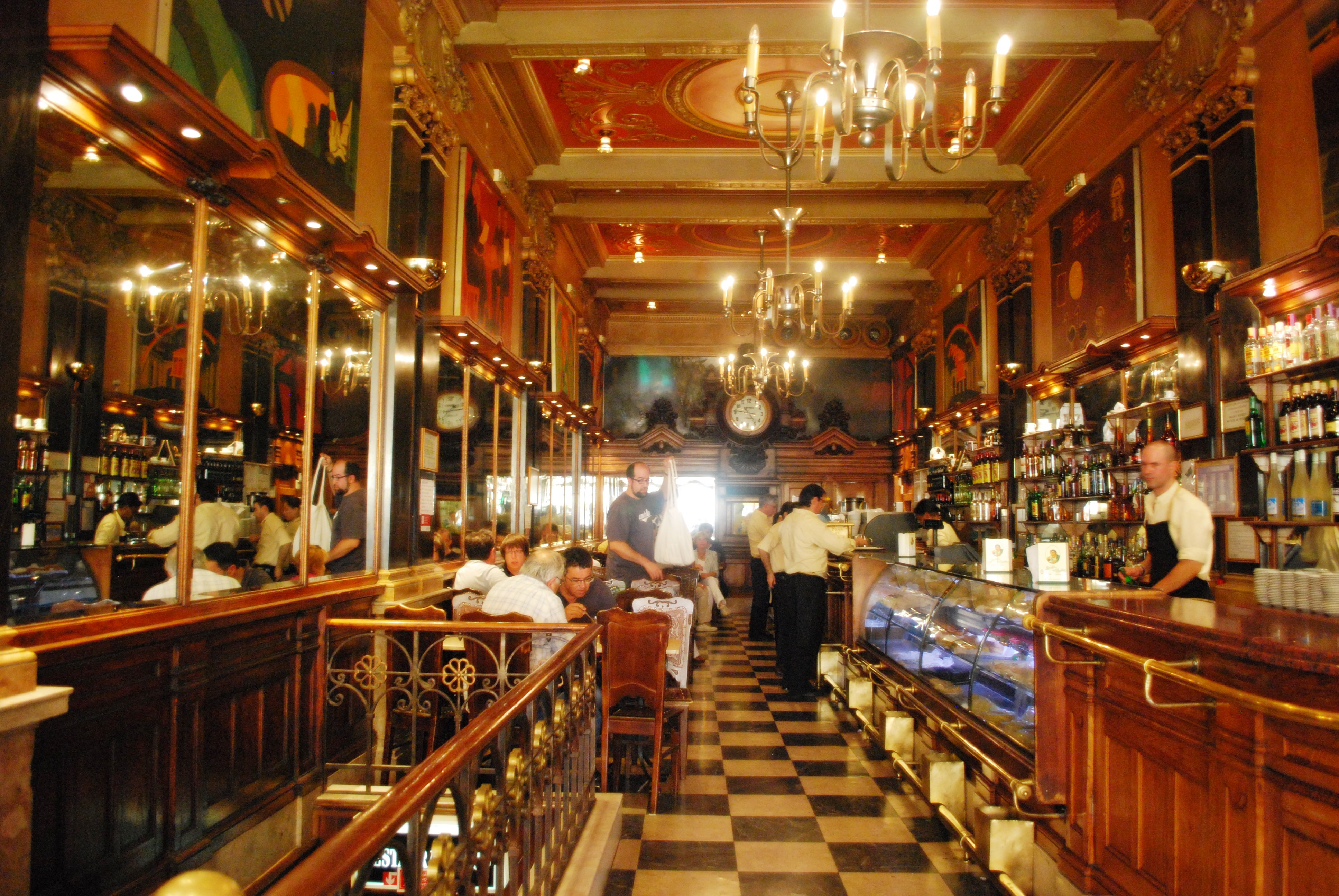 Interior do Café A Brasileira, Lisboa This file was uploaded for Wiki Loves Monuments in Portugal with the unique identifier 74475.